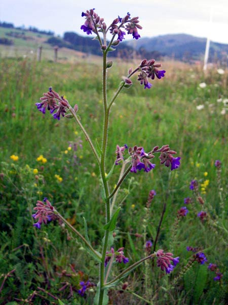 аутор Снежана Трифуновић Биљни органи